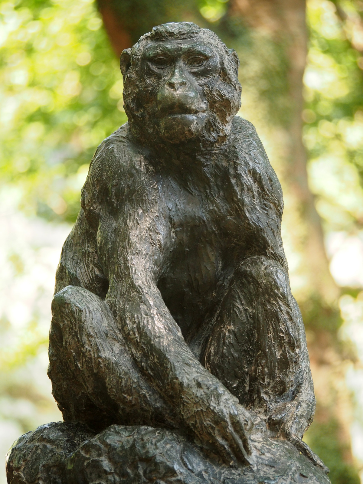 高崎山自然動物園（大分県大分市）にあるジュピターの像（朝倉文夫作）